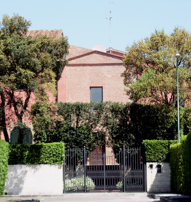 Facciata della Chiesa di San Giovanni a Grosseto